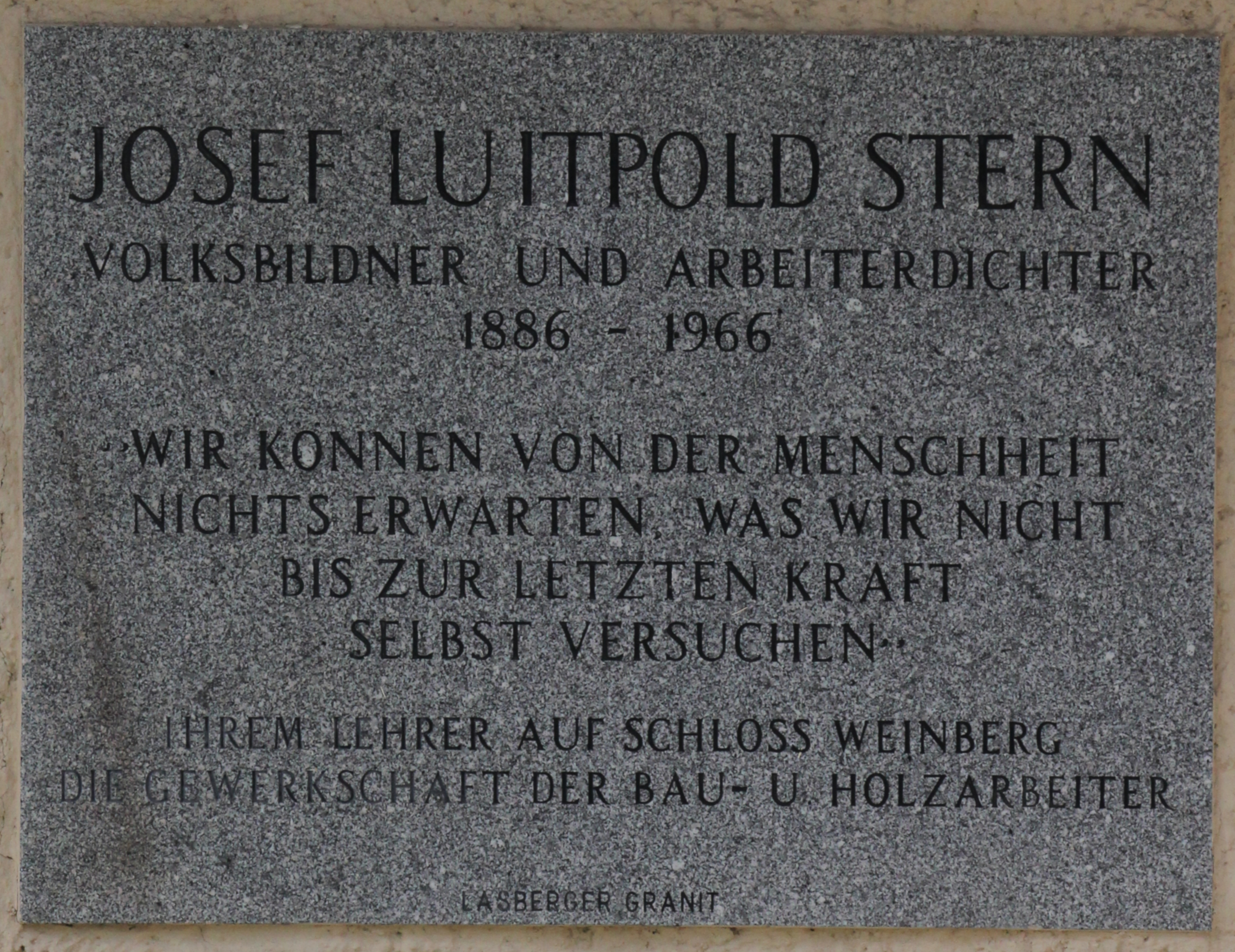 Rundgang im Schloss Weinberg in Kefermarkt